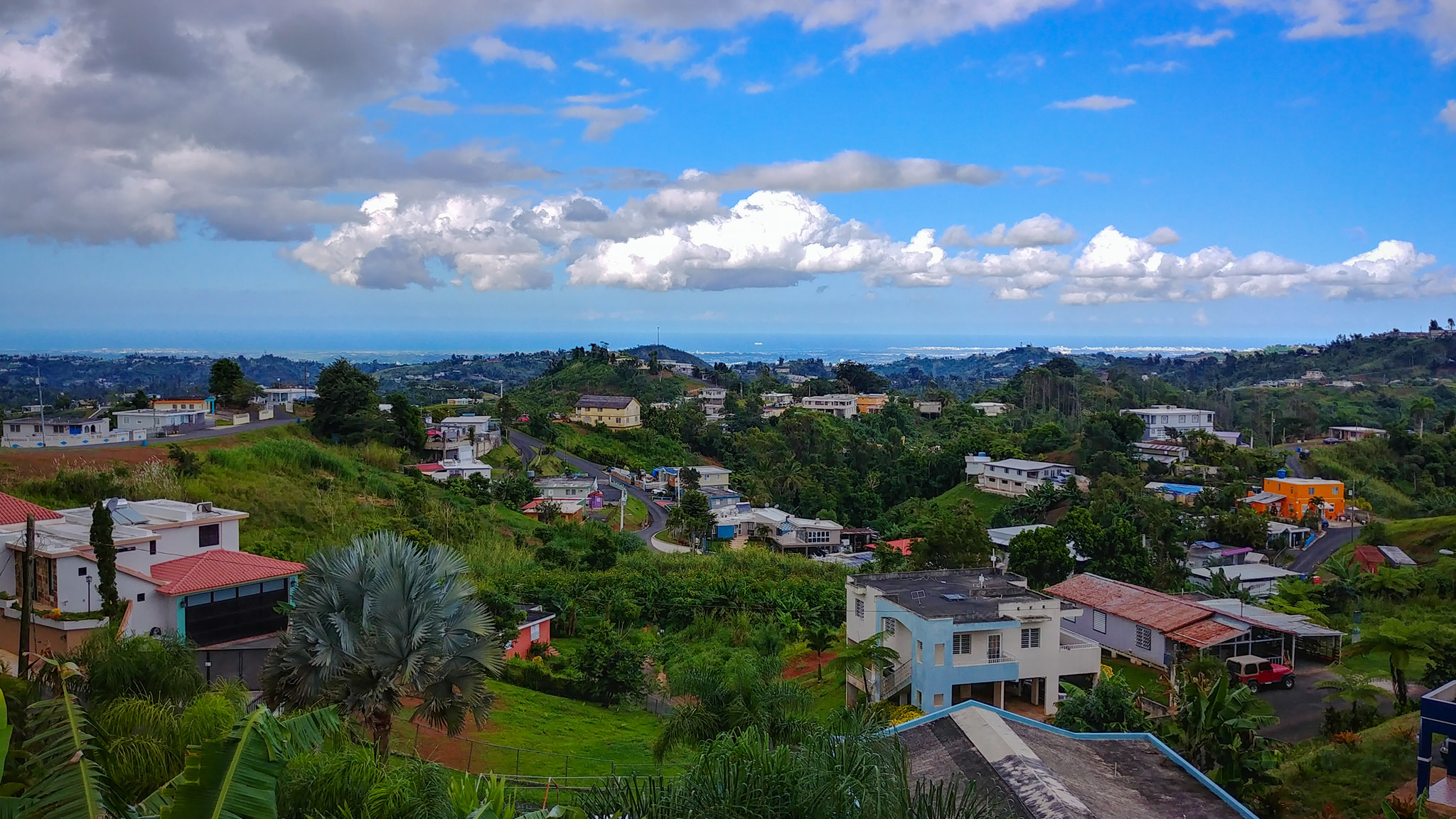 Barrio Cedro Arriba, Naranjito, Puerto Rico (2019)